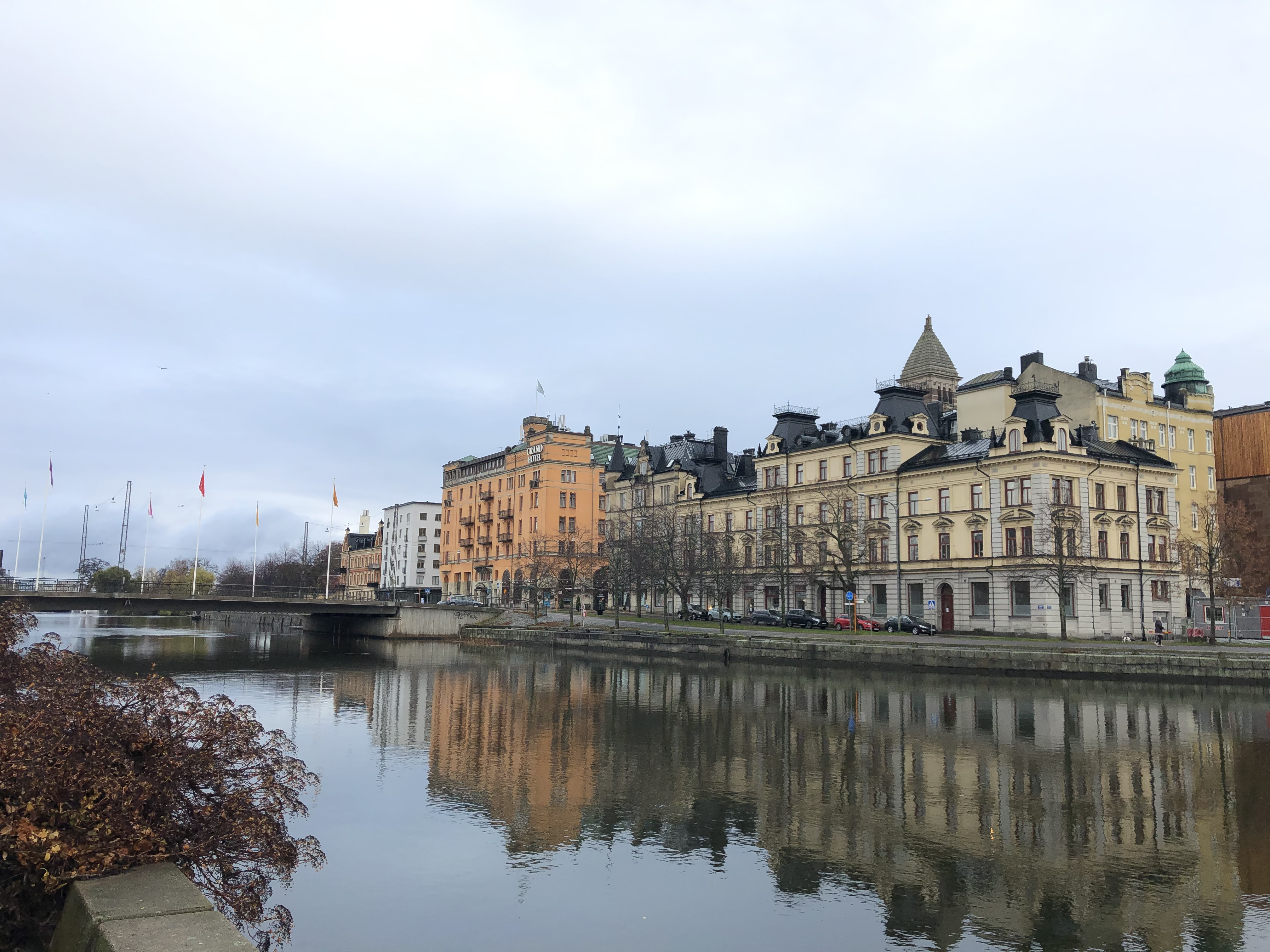 Норрчепинг